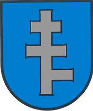 Herb miasta Leszniów